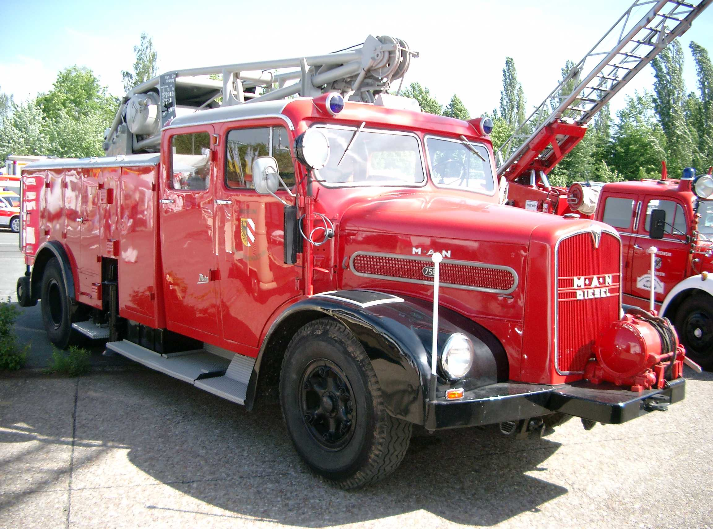 Rüstkranwagen 10 to RKW 10 (ehemals Berufsfeuerwehr Nürnberg)